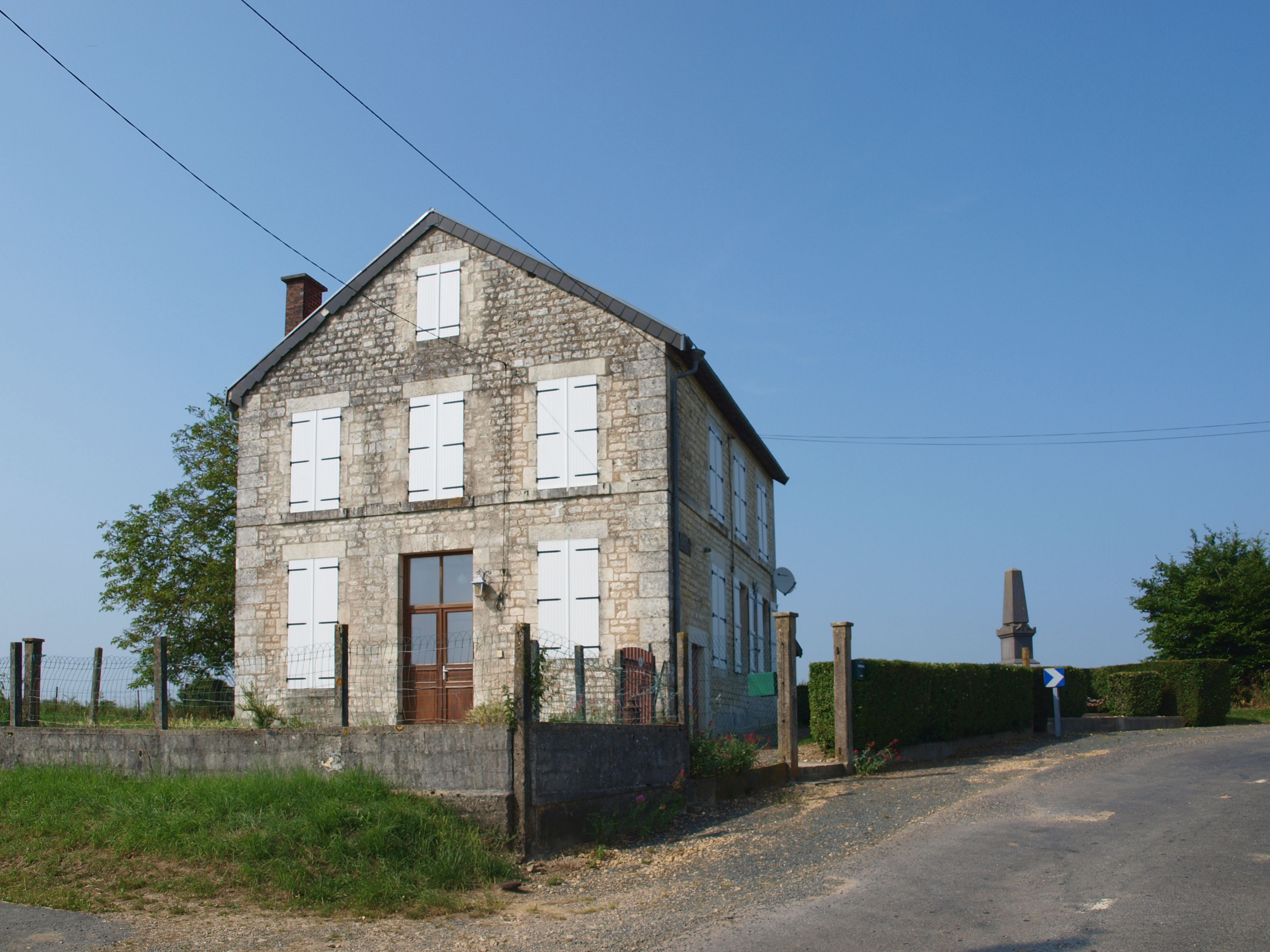 Artaise-le-Vivier (Ardennes, France) ; la mairie se trouve entre les deux sections de la commune, mais proche de Le Vivier.